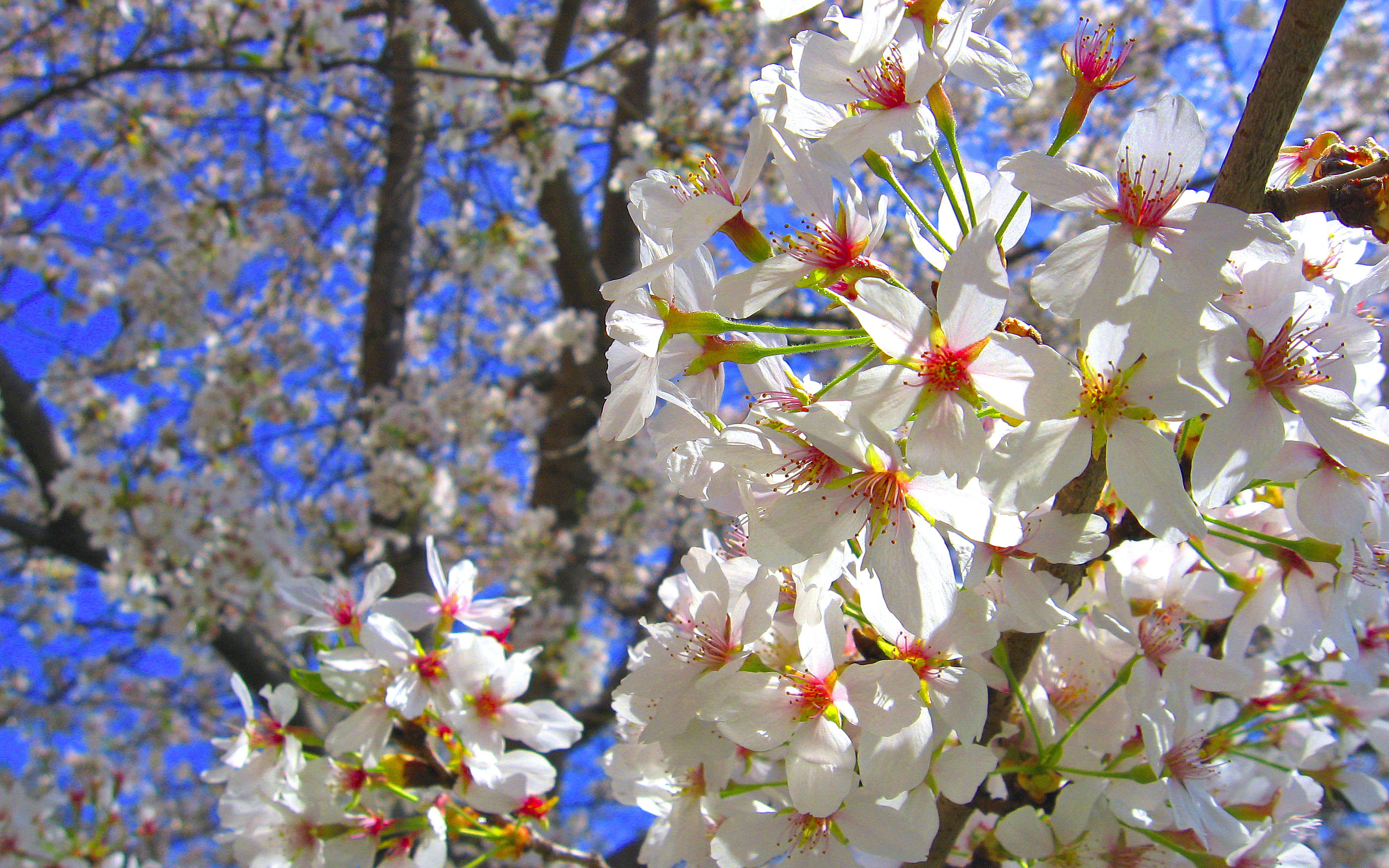 Sakura